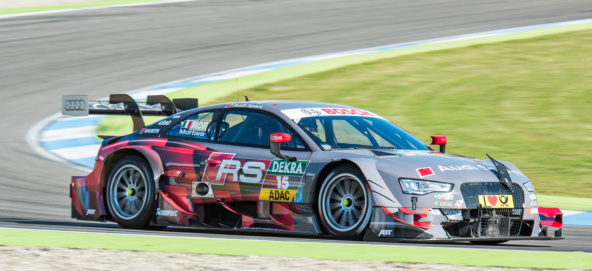 Abt Sportsline GmbH,Audi Sport Audi RS 5 DTM,DTM,Deutsche Tourenwagen Masters,Edoardo Mortara,Hockenheimring,Motorsport